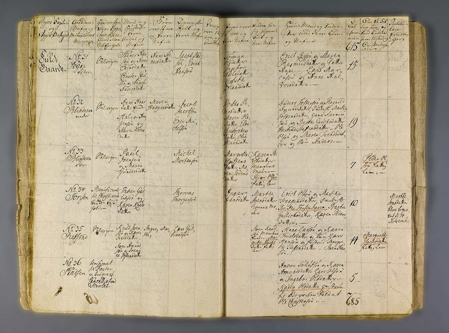 Riksarkivet, Fogderegnskap, Aker og Follo fogderi, eske 559, ekstraskatt 1763, vedl 5